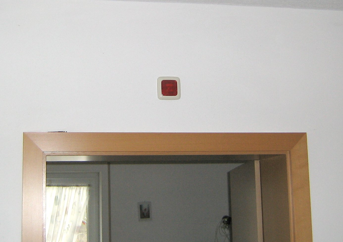 lichtruf